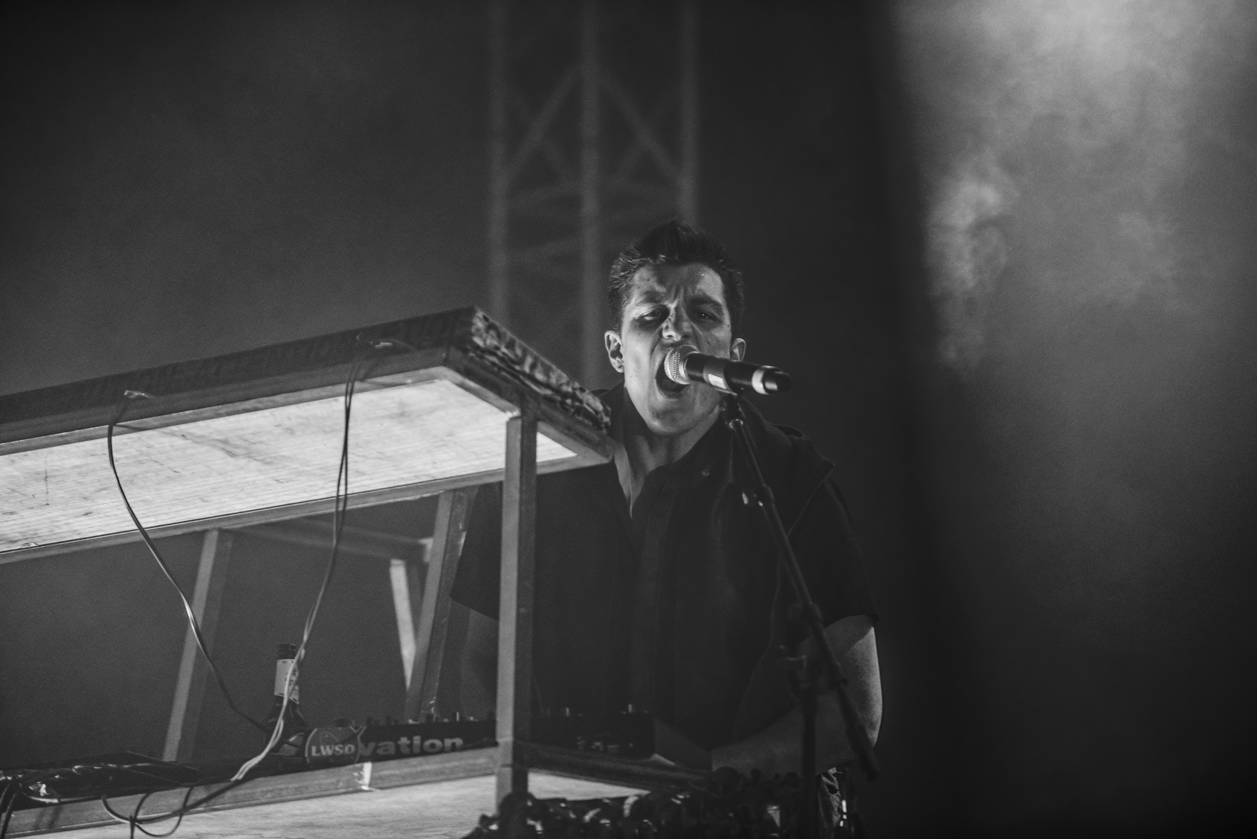 E-Tropolis Festival 2016; Oberhausen Turbinenhalle - Frontline Assembly